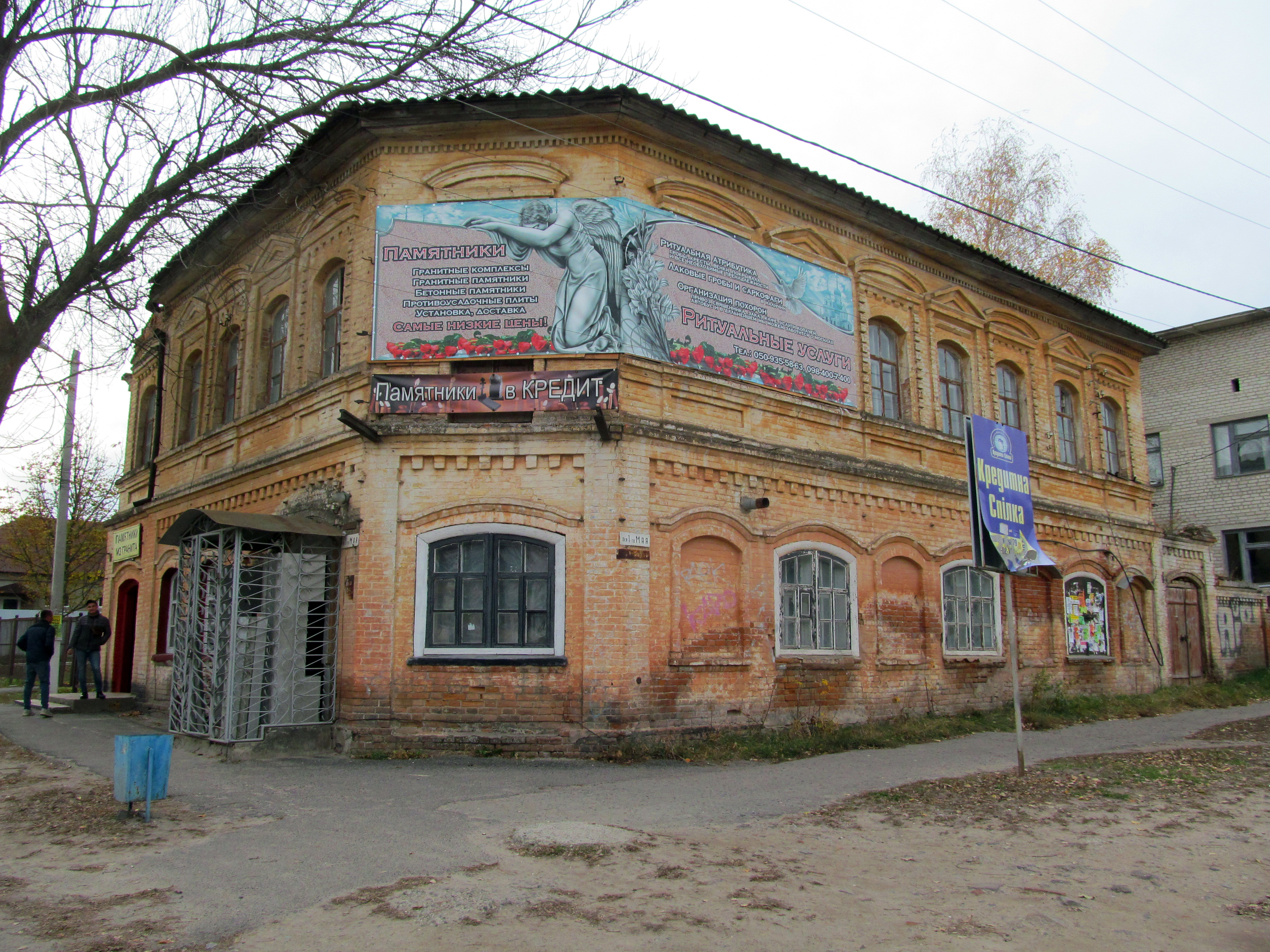 Колишній будинок купця Дукина в м. Балаклія Харківської області. На перехресті вулиці 1-го Травня й провулку 1-го Травня. Фото було зроблене під час поїздки для проведення віківишколу з редагування Вікіпедії у Балаклійській центральній районній бібліотеці для бібліотекарів міста Балаклія та Балаклійського району в рамках проекту «ВікіХарківщина» (м. Балаклія, 3 листопада 2018 року).